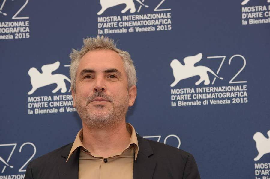 Alfonso Cuarón, President jury Venezia 72